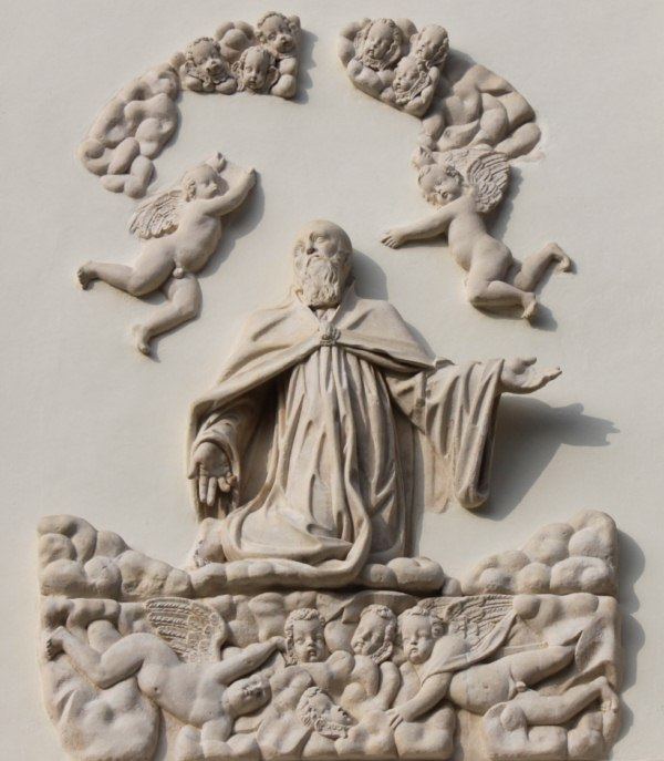 La gloria di San Benedetto a San Benedetto Vecchio